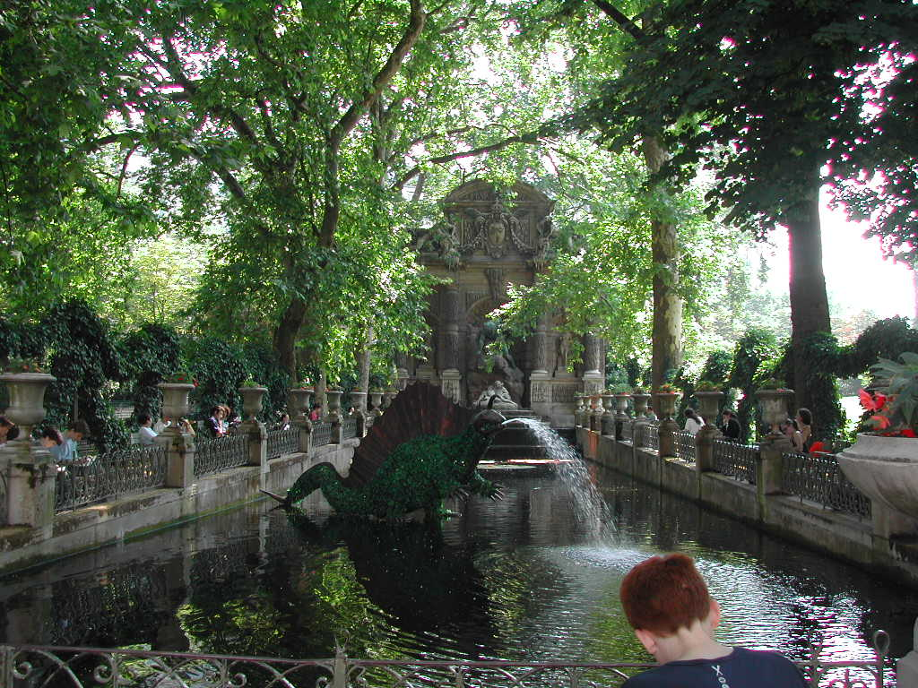 Paris, Jardin du Luxembourg, Fontaine Médicis - installation juin 2003